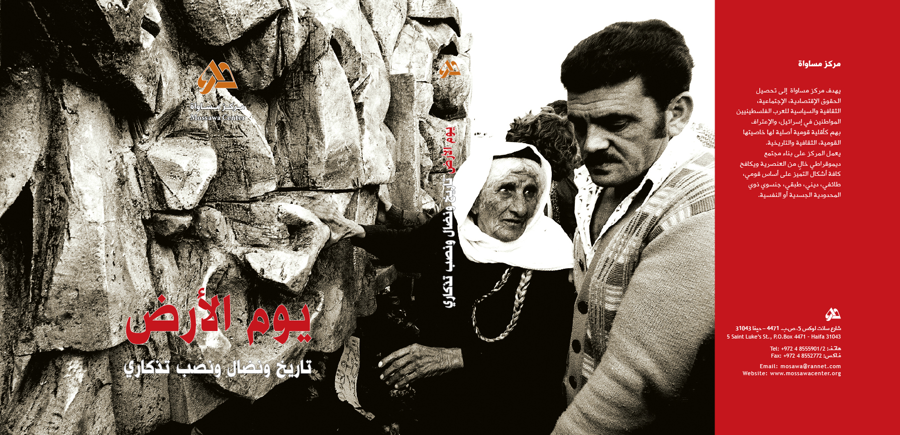 בן צבי, טל, חאלילה, שאדי, פרח, ג'פאר (עורכים), 2008. יום האדמה: היסטוריה, מאבק ואנדרטה (בערבית), הוצאת עמותת מוסאוא, חיפה עיצוב גרפי: ואיל ואכים